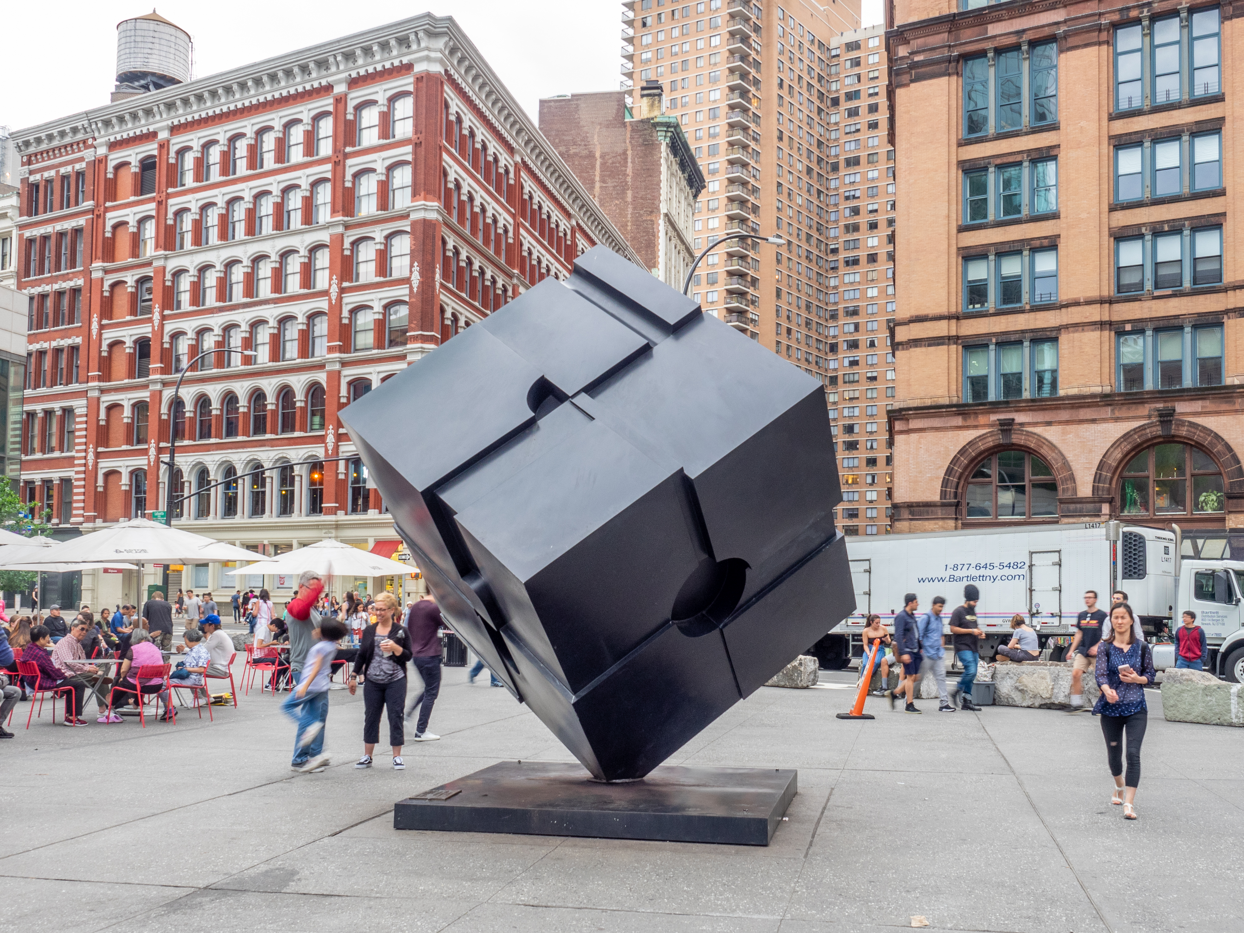 Greenwich Village, NYC